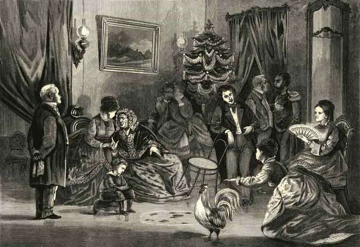 Гравюра Кампо Вейермана по рисунку Г. Тихомирова. Святочное гадание с петухом. Вторая половина XIX века.